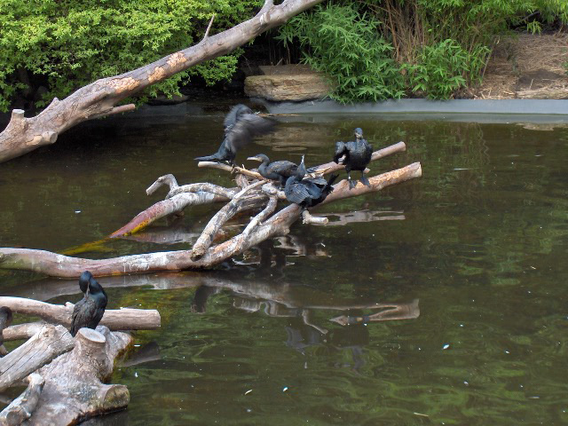 Species Phalacrocorax carbo Family Phalacrocoracidae